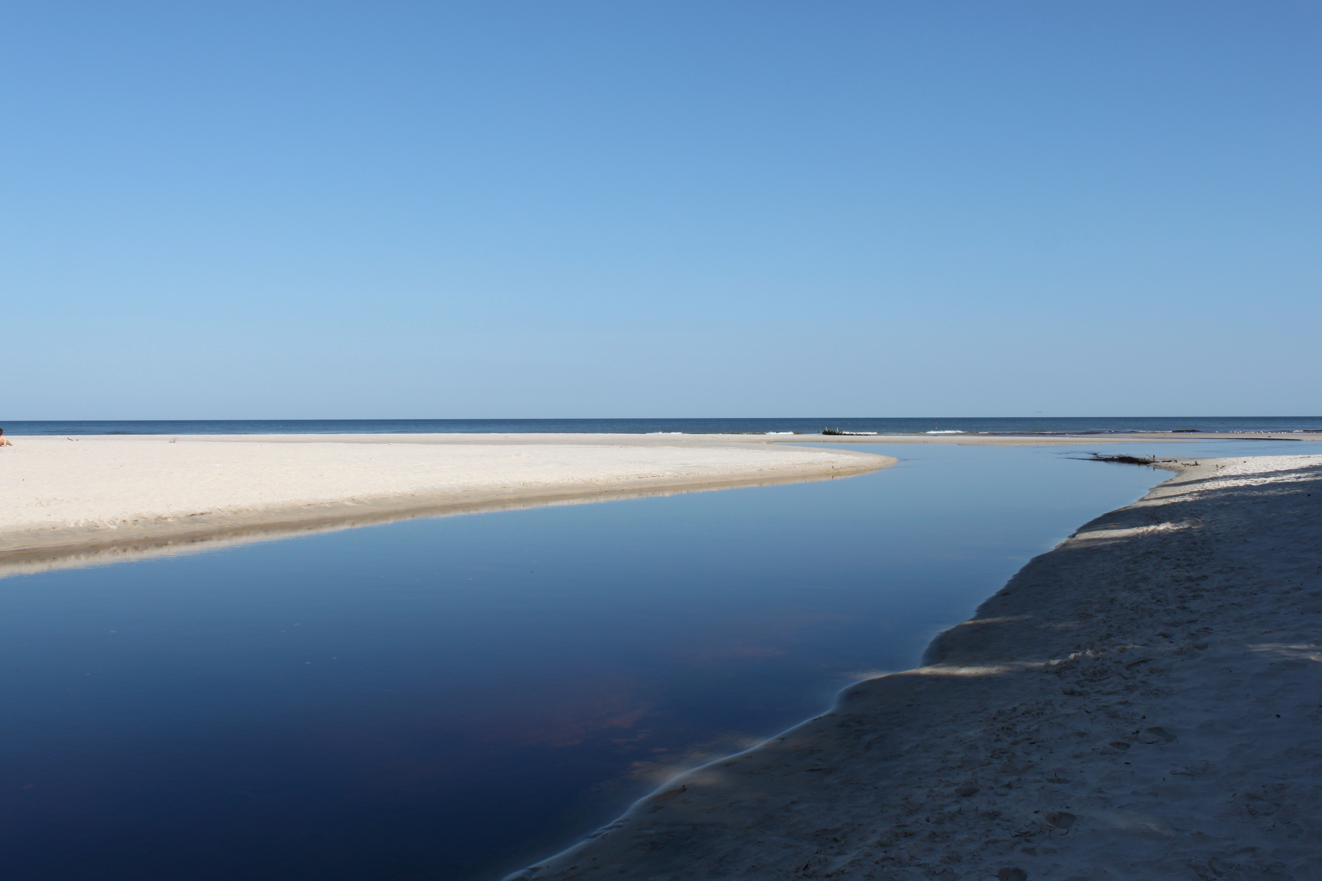 Park krajobrazowy Nadmorski Park Krajobrazowy.